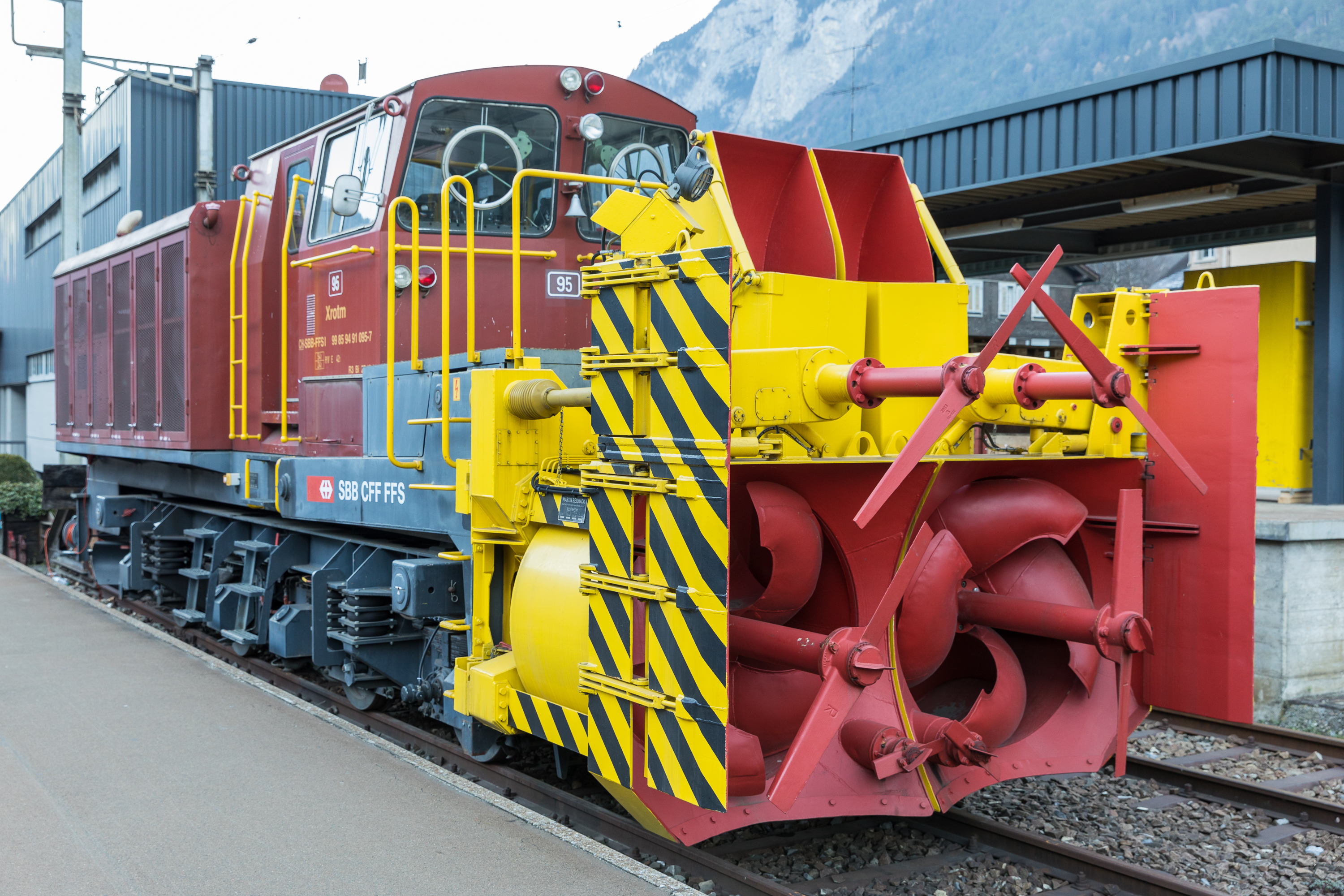 SBB CFF FFS Xrotm Schneeschleuder in Erstfeld UR